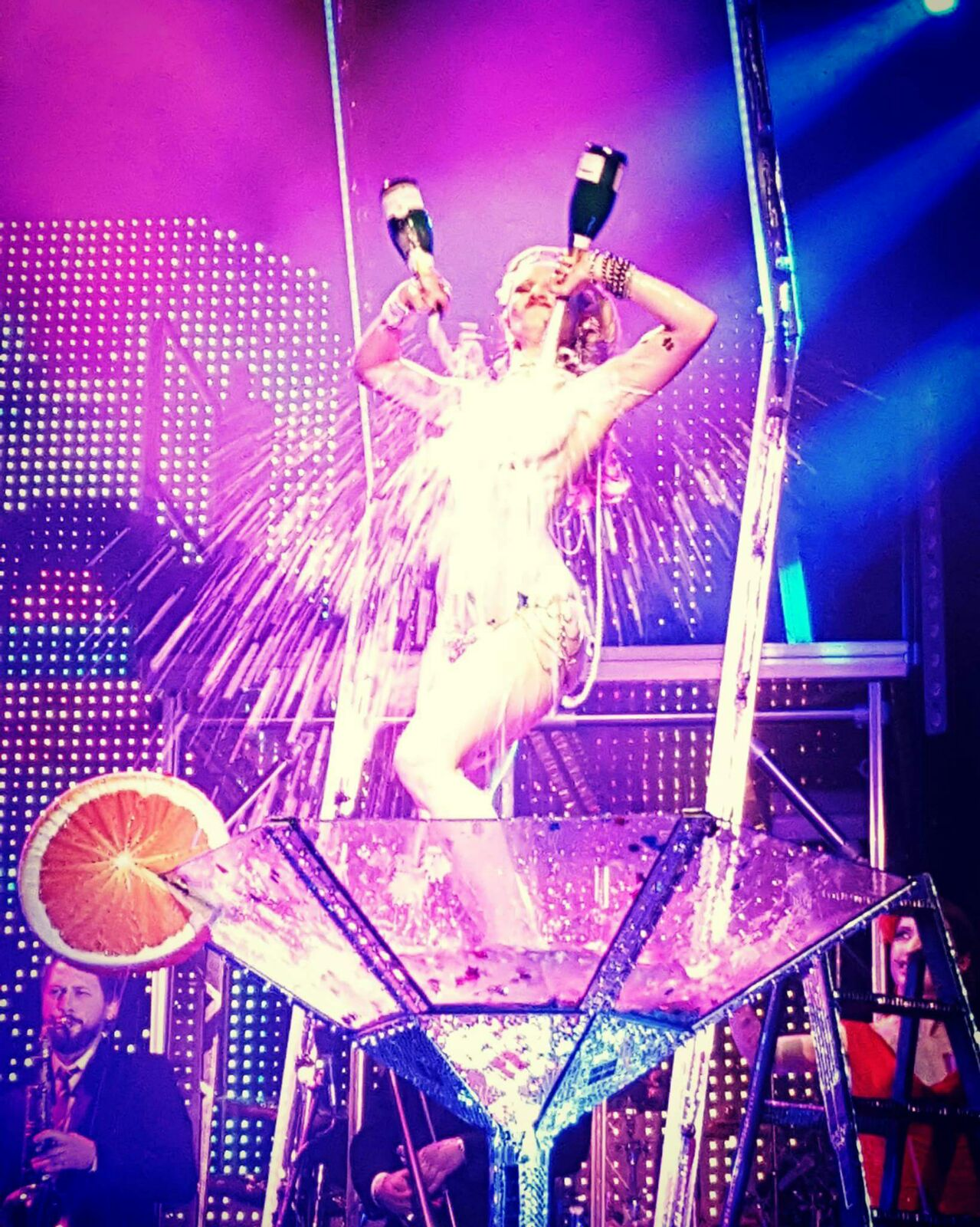 Marlene von Steenvag performt auf dem Berlin Burlesque Festival in Berlin (2016).